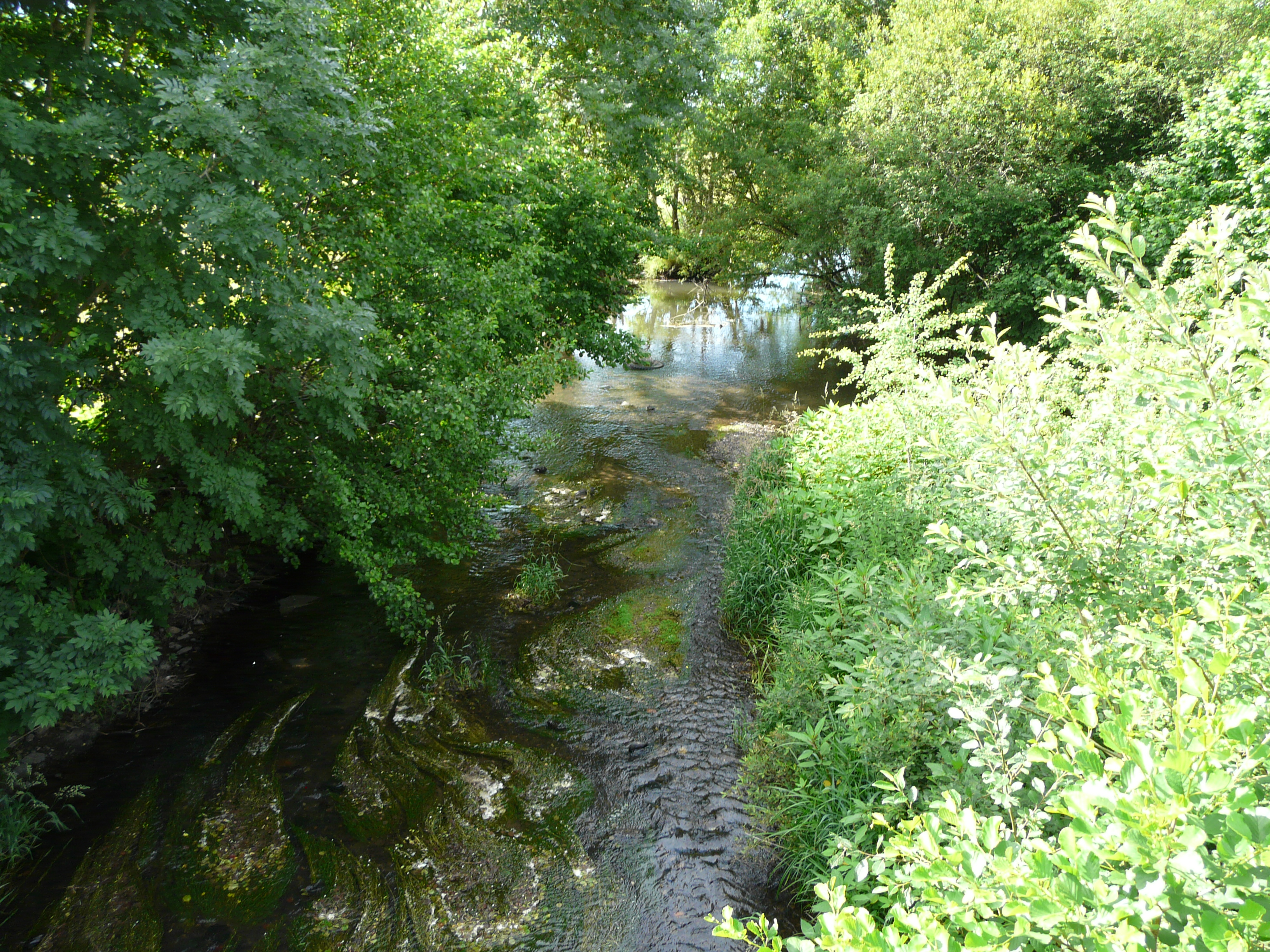 L'Authre au pont de la route départementale 120, Ytrac, Cantal, France. Vue prise en direction de l'aval.